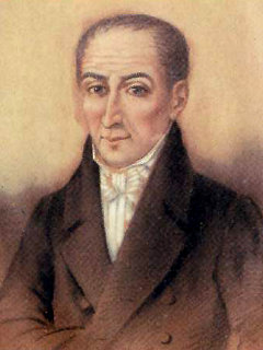 Juan José Paso, integrante de la Primera Junta